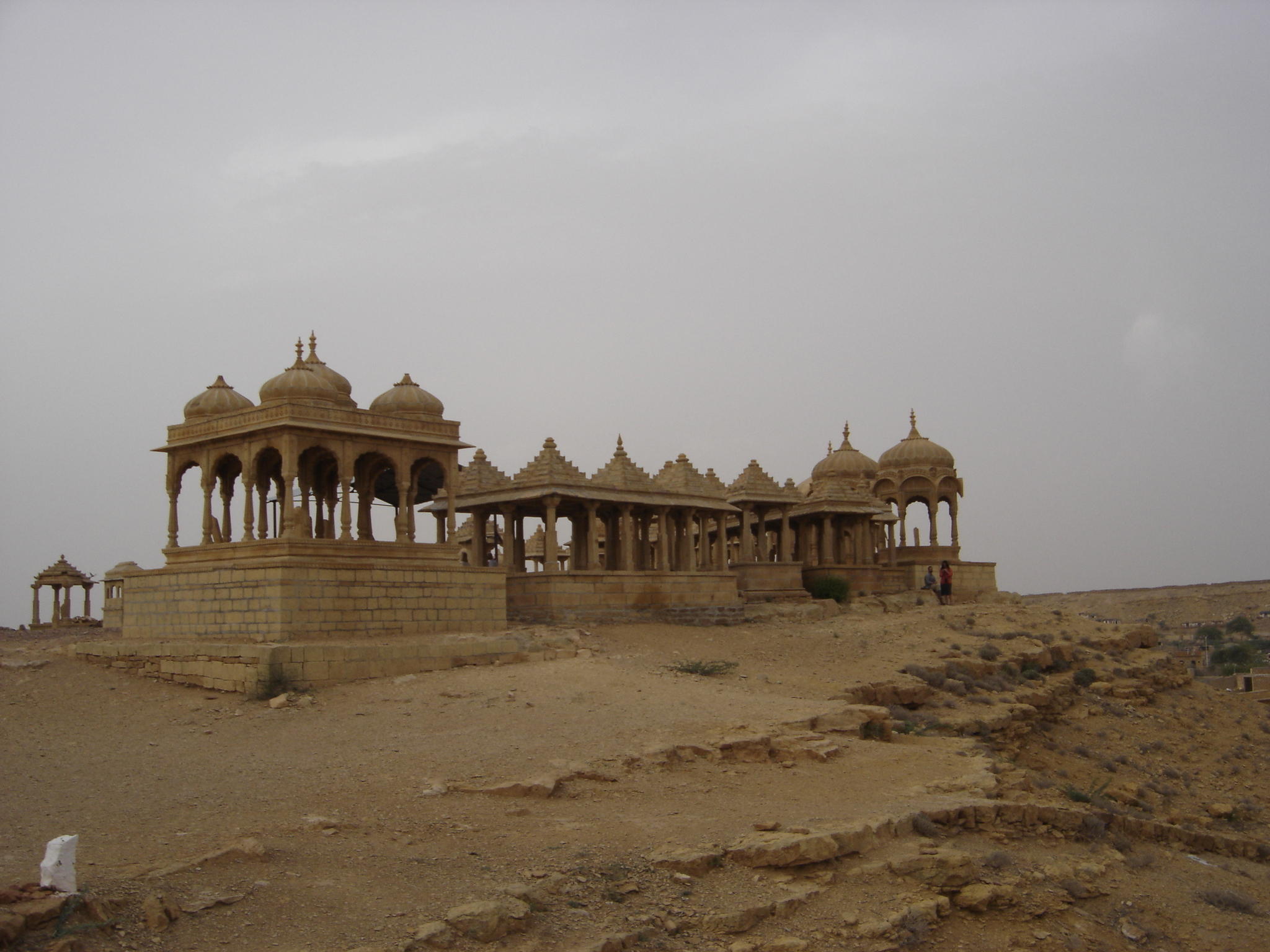 Lieu des crémations funéraires près de Jaisalmer